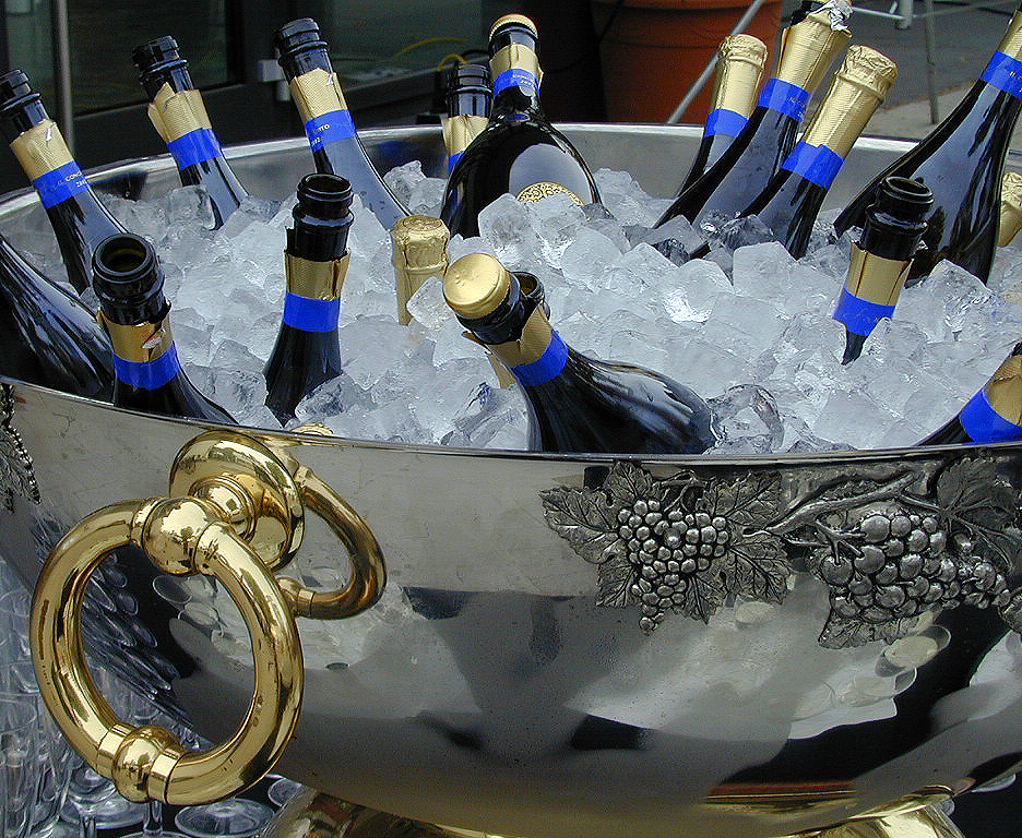 Champagner-Flaschen im Eis-Kühler